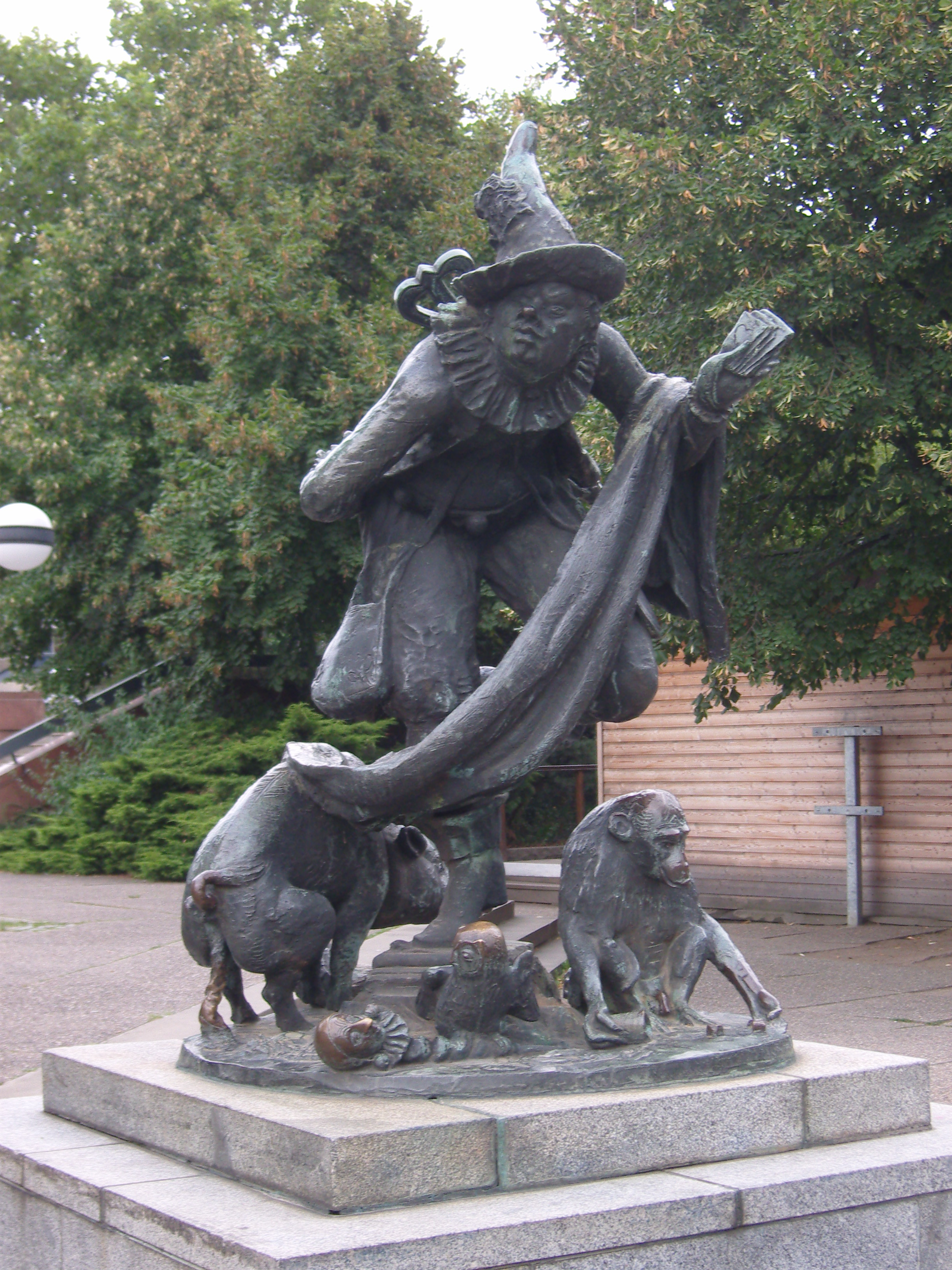 Bronzeplastik des Künstlers Heinrich Apel, die den Hofnarren Joseph Fröhlich darstellt, Elbufer in Dresden